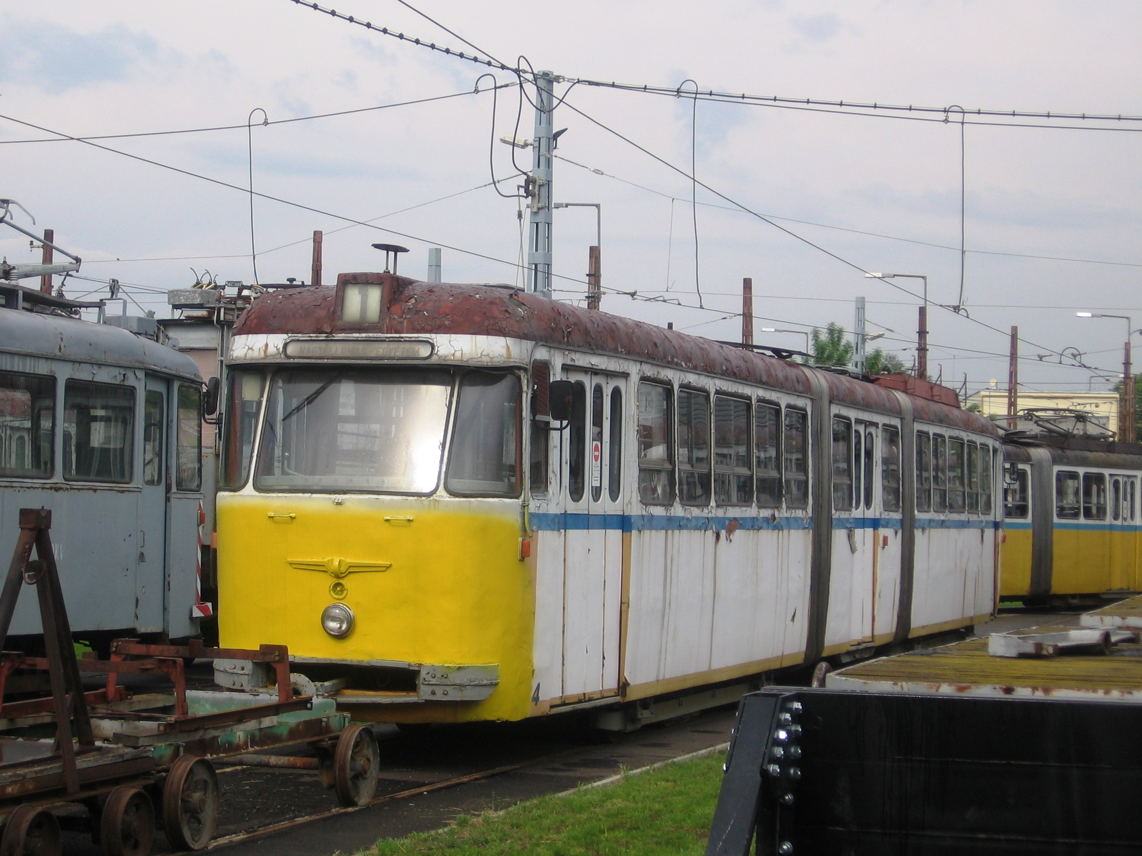 A 484-es villamos a DKV telephelyén. Különlegessége, hogy 6 ajtós kivitelben készült. A jármű ki lett jelölve nosztalgiának, ám jelenleg nem üzemképes és pénzhiány miatt kérdéses, hogy valaha fog-e még közlekedni.